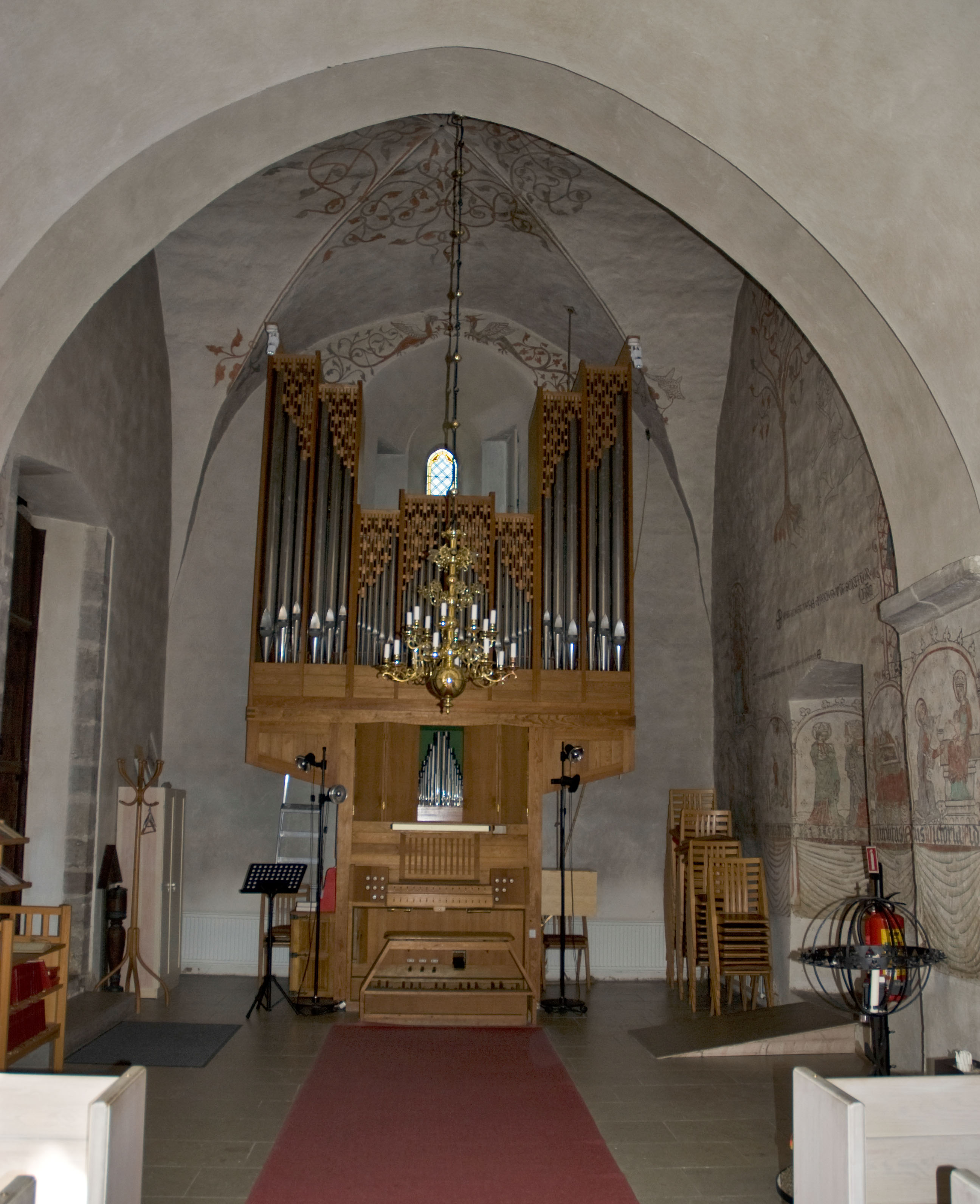 Hemse kyrka, Gotland